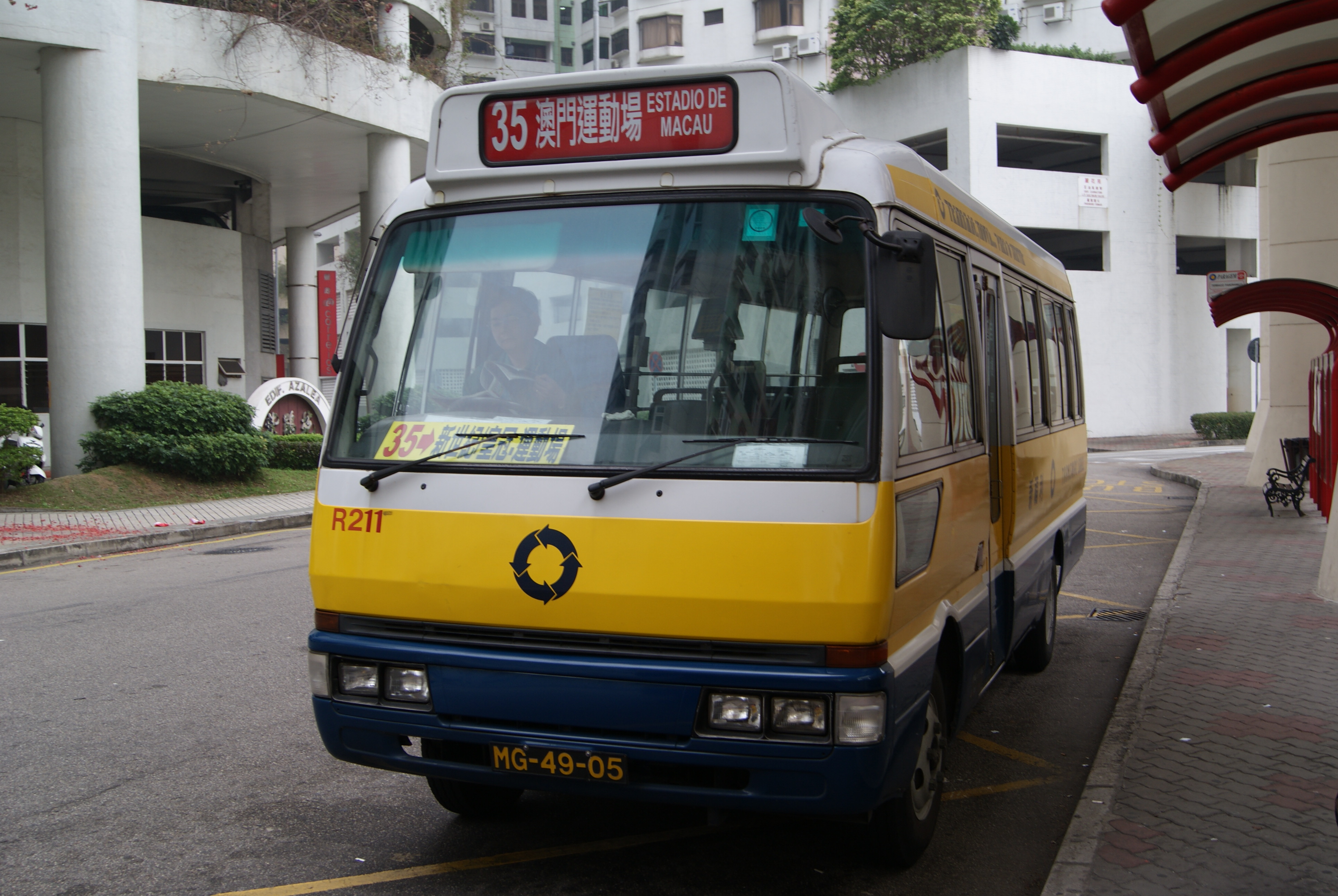 新福利三菱Rosa小巴R211行駛35路線